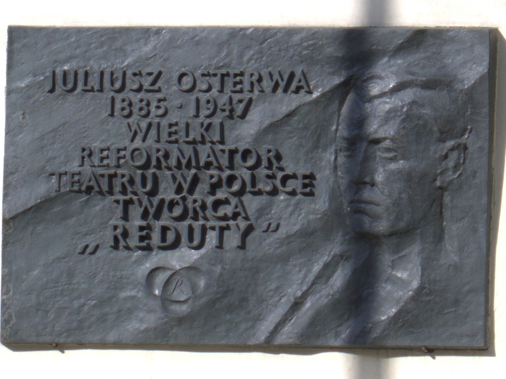 Tablica upamiętniająca pobyt Juliusza Osterwy w Warszawie.